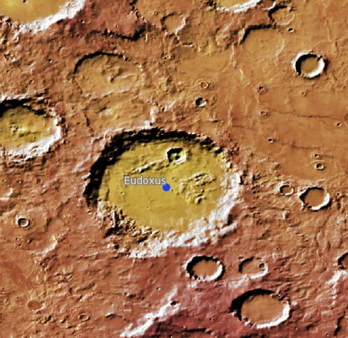 Cráter marciano Eudoxus. (IAU/USGS/Goddard/A SU/USGS)